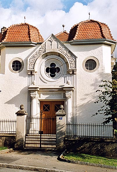 Synagoge von Delémont Foto: Roland Zumbühl, Arlesheim, Oktober 2000